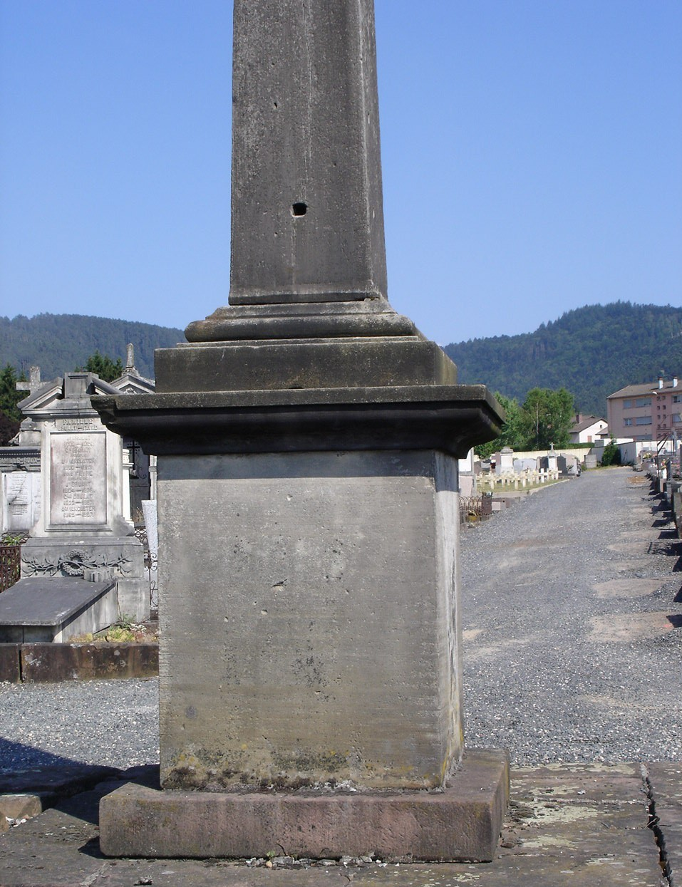 Piédestal de la croix centrale du cimetière de la Haute Chapelle Raon-l'Etape 88372